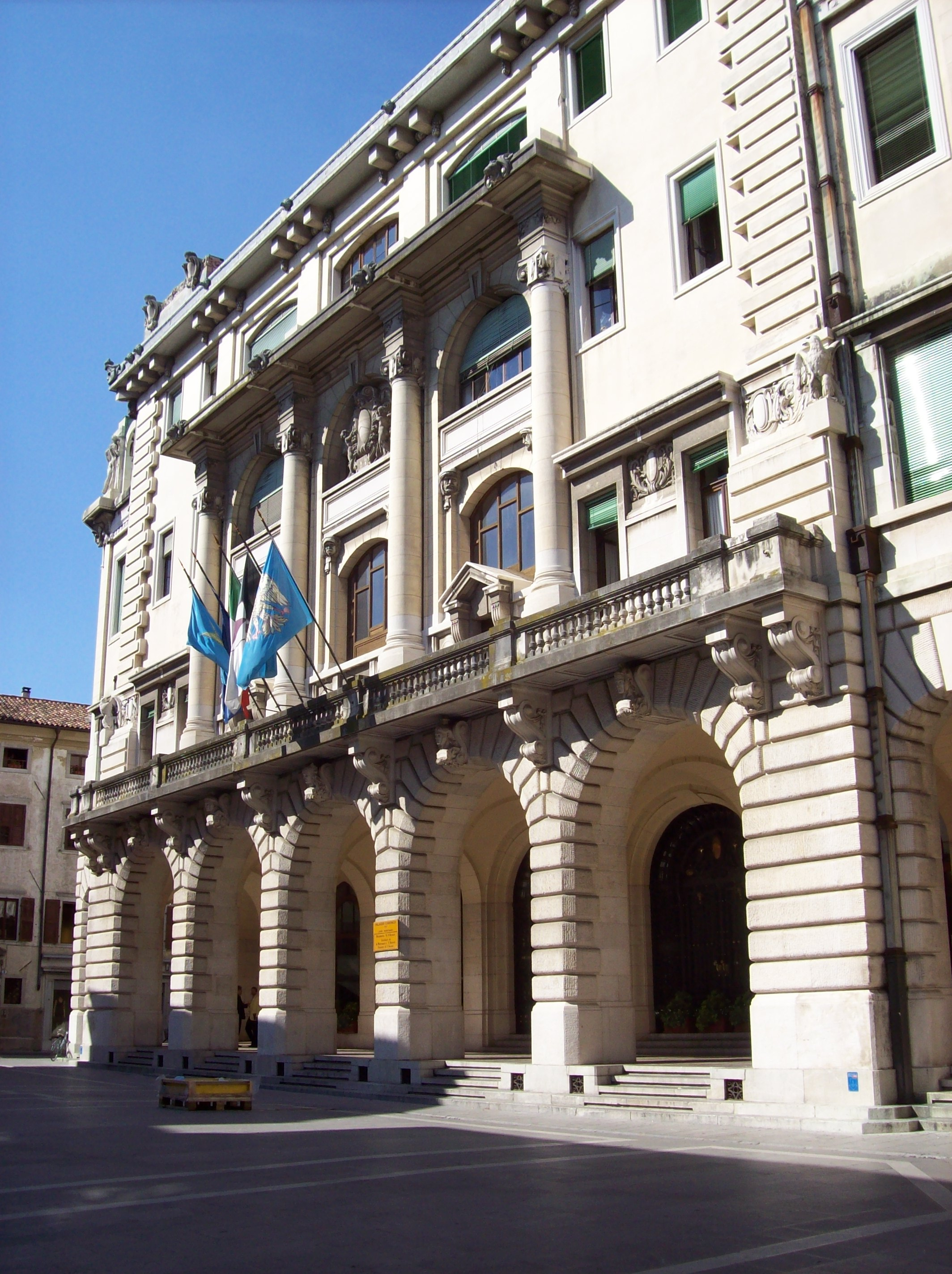 Udine - Palazzo D'Aronco, sede del Comune di Udine, in stile Liberty (1911-1932).